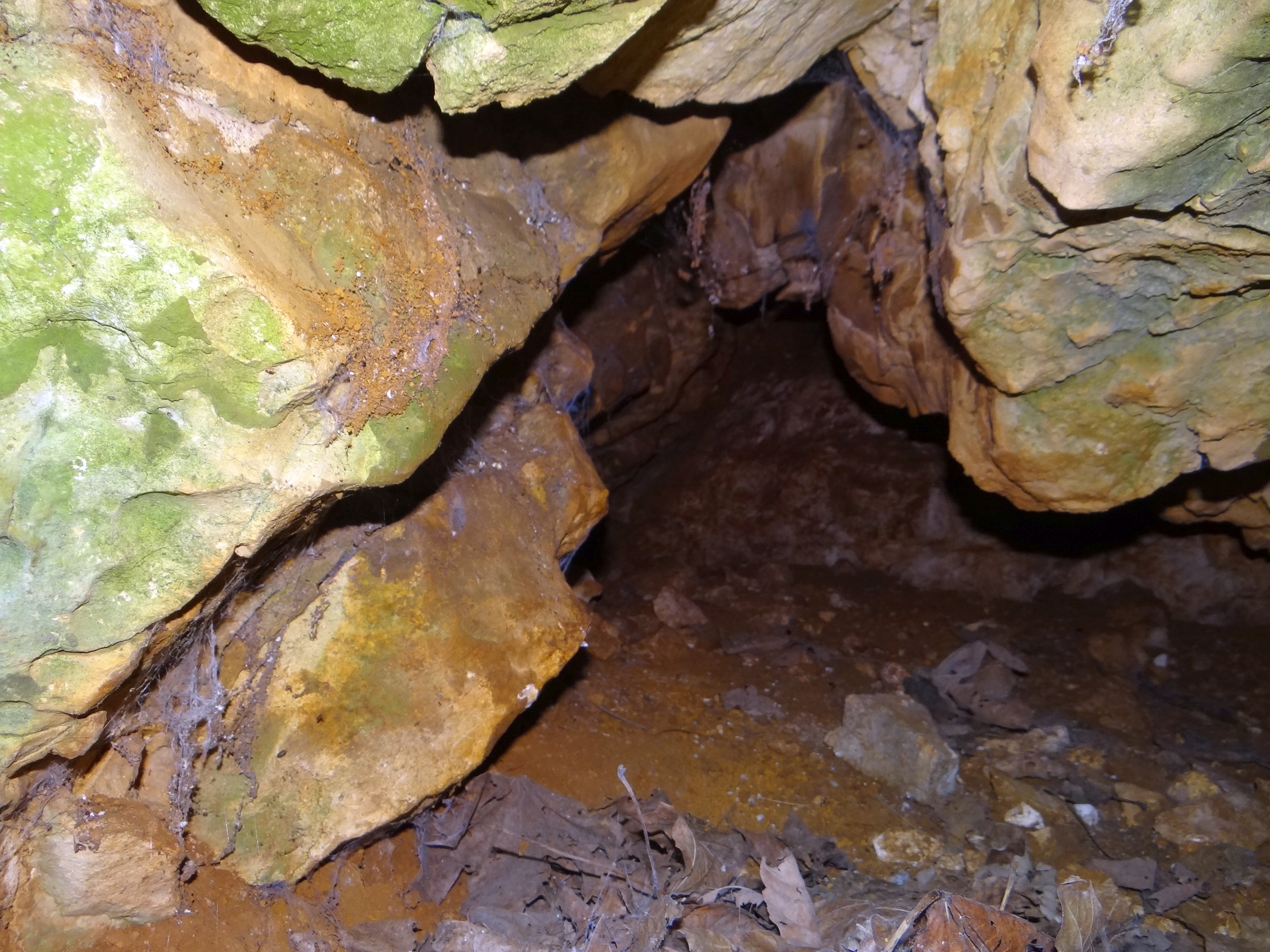 Jaskinia Wywiew na Zakrzówku w Krakowie